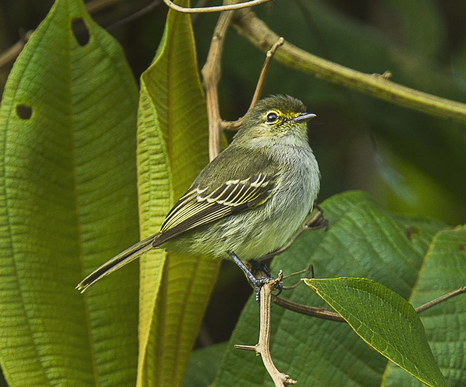 Loja tyrannulet or Peruvian tyrannulet (Zimmerius viridiflavus) - South Ecuador_S4E9950